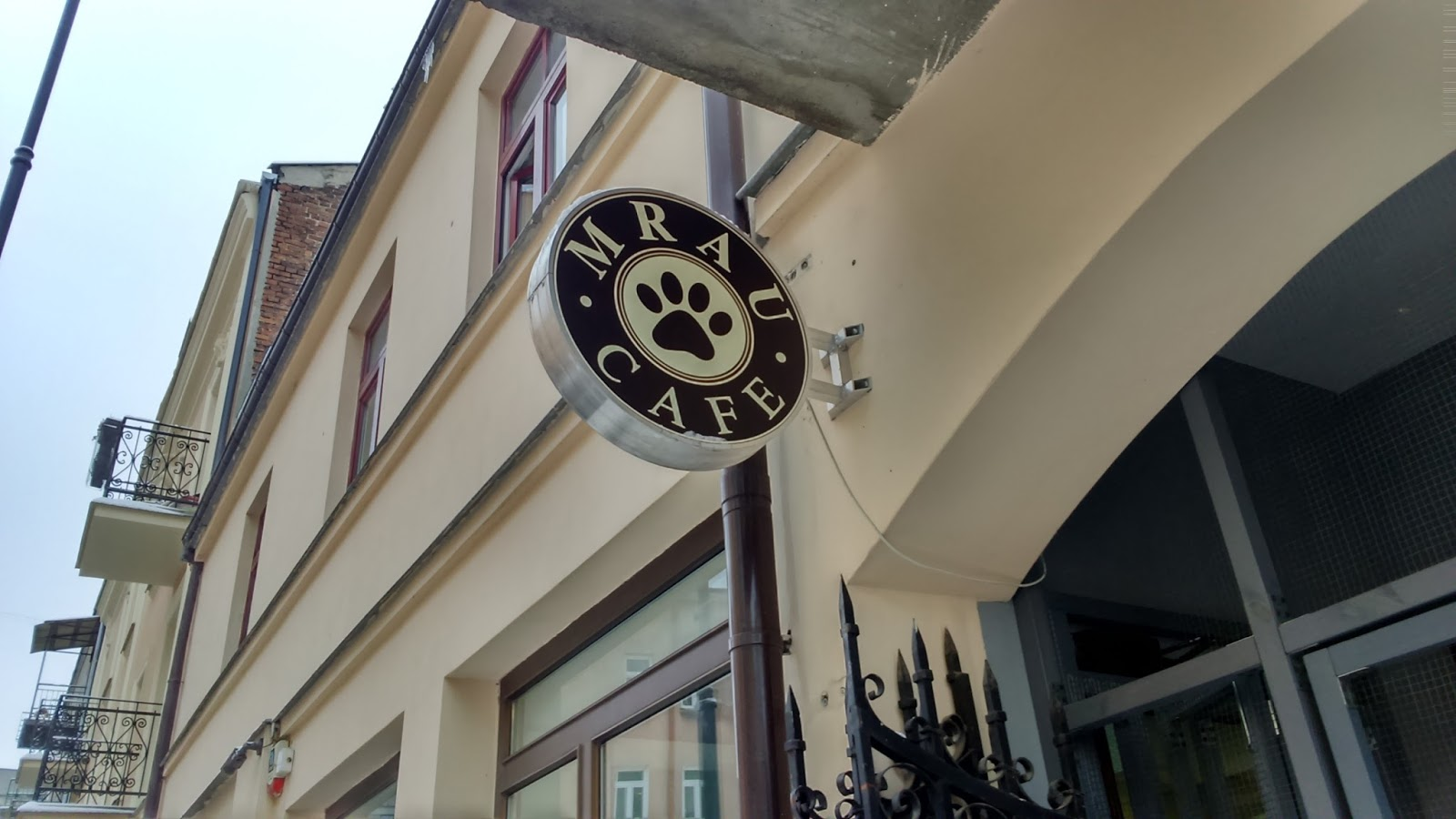 Szyld kociej kawiarni w Lublinie